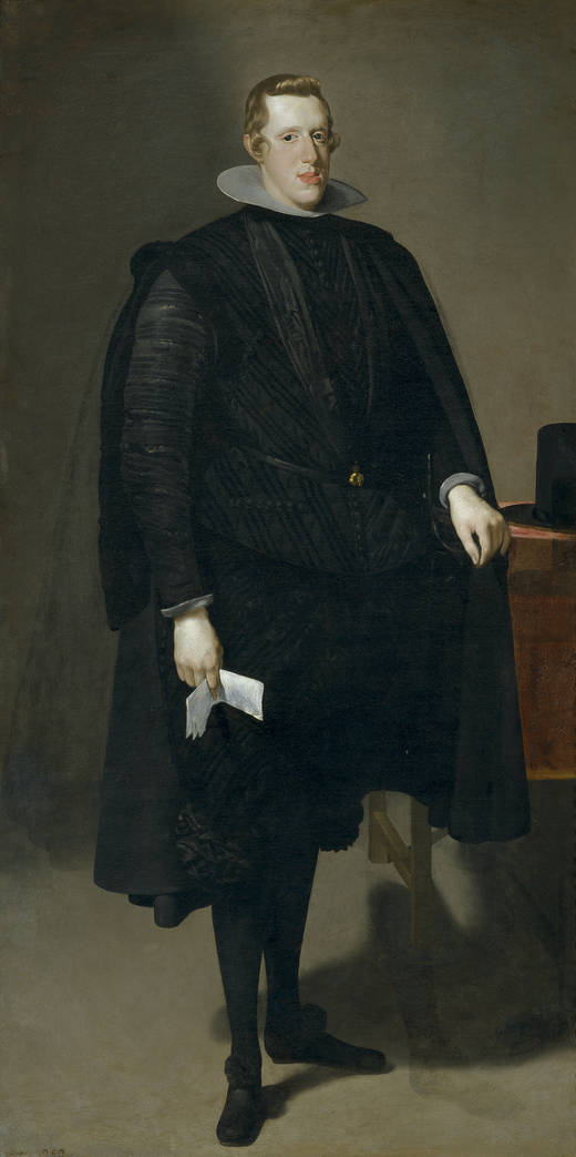 Retrato del rey Felipe IV de España (1601-1665), que fue hijo del rey Felipe III de España y de la reina Margarita de Austria.